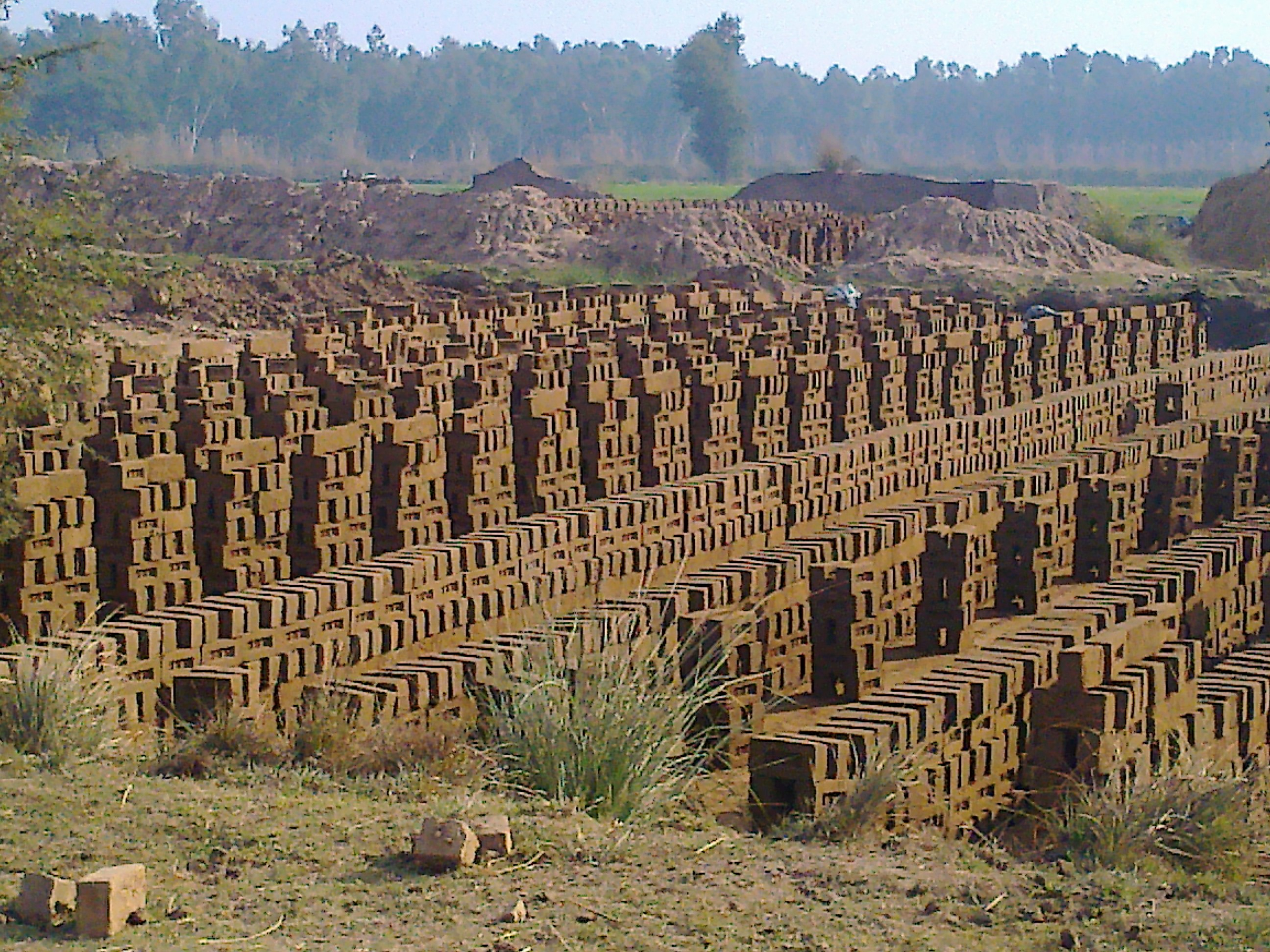 muds